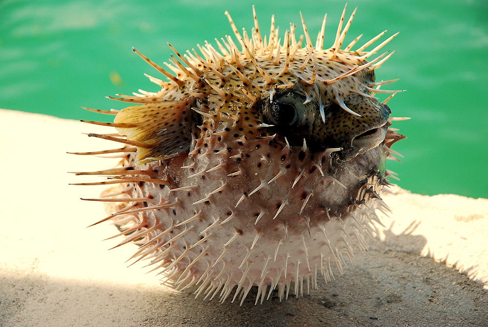 faththu gelligen ulhunu maapu ge MAS.